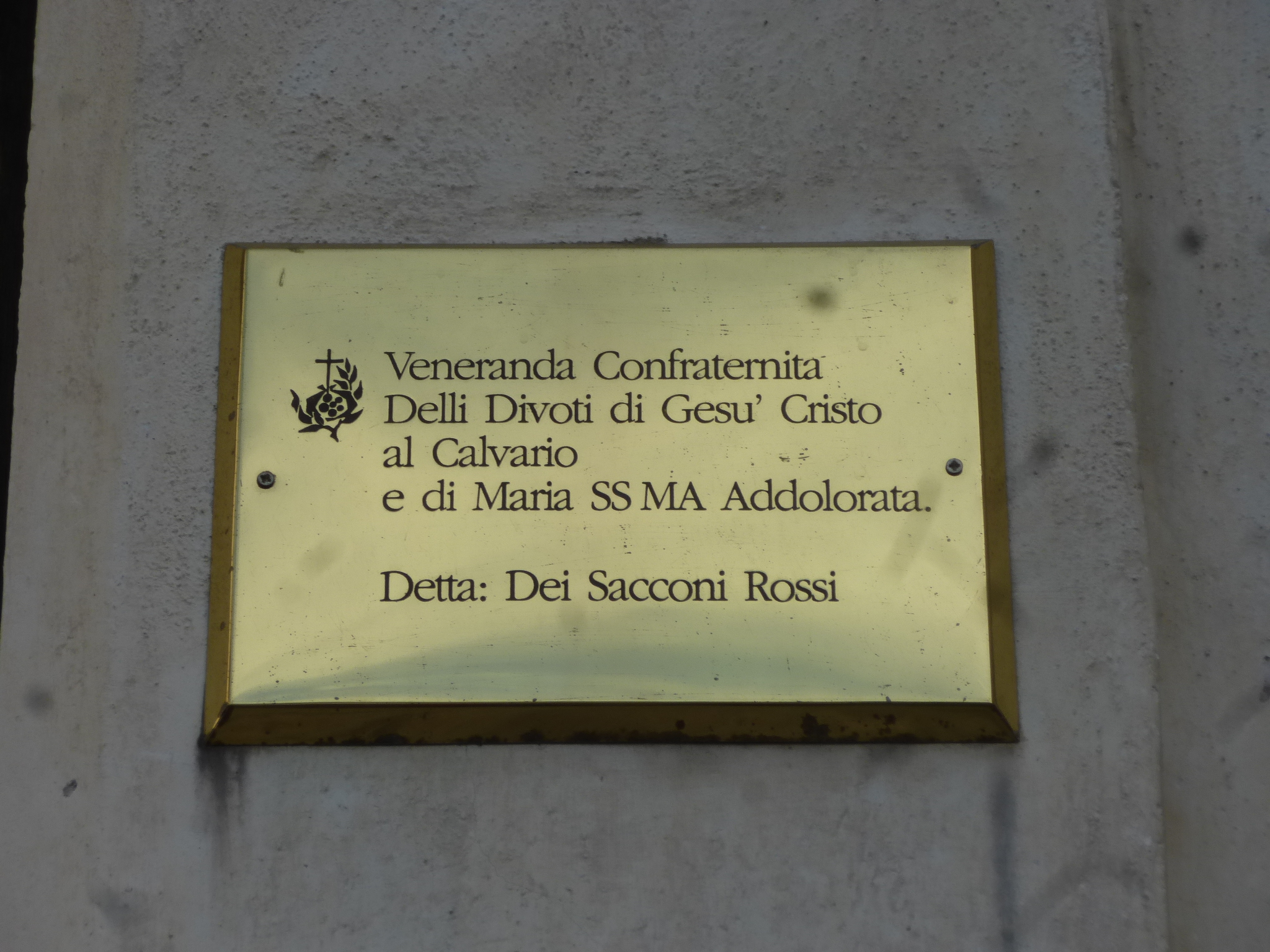 Roma, piazza di S. Bartolomeo all'Isola, i Sacconi rossi.